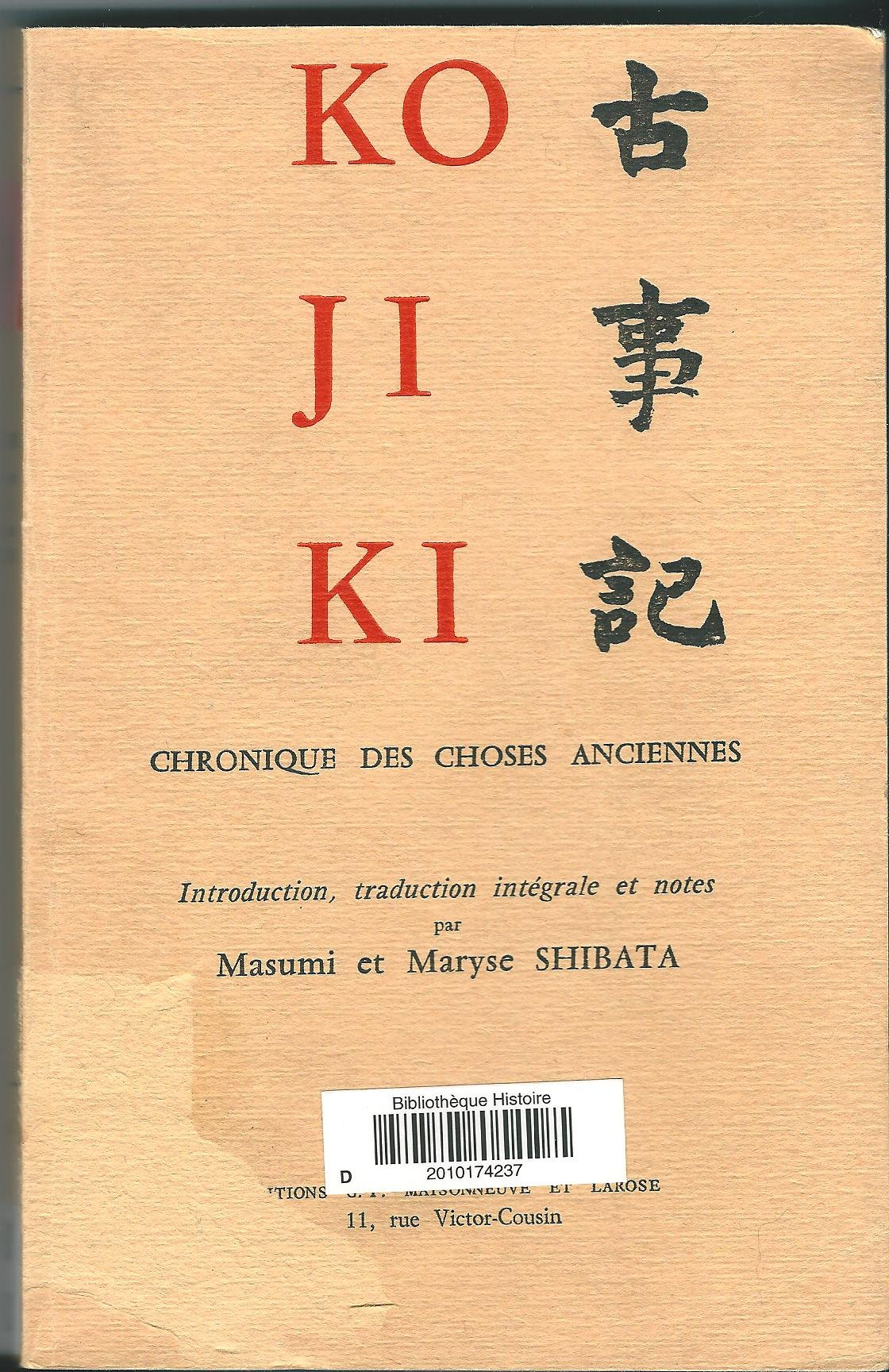 Edition française du Kojiki